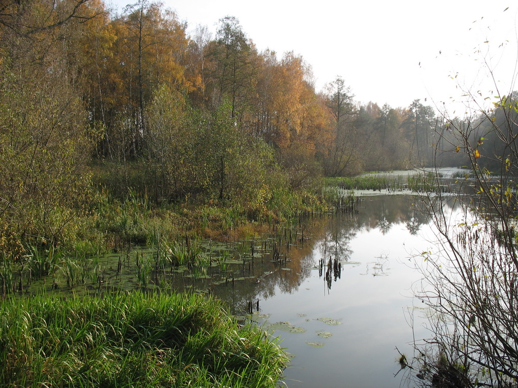 Чернігівська обл., Менський р-н, с. Киселівка. Центр. Річка Мена біля "острова". Вигляд з пішохідного моста - "перехуодки" на місцевому діалекті